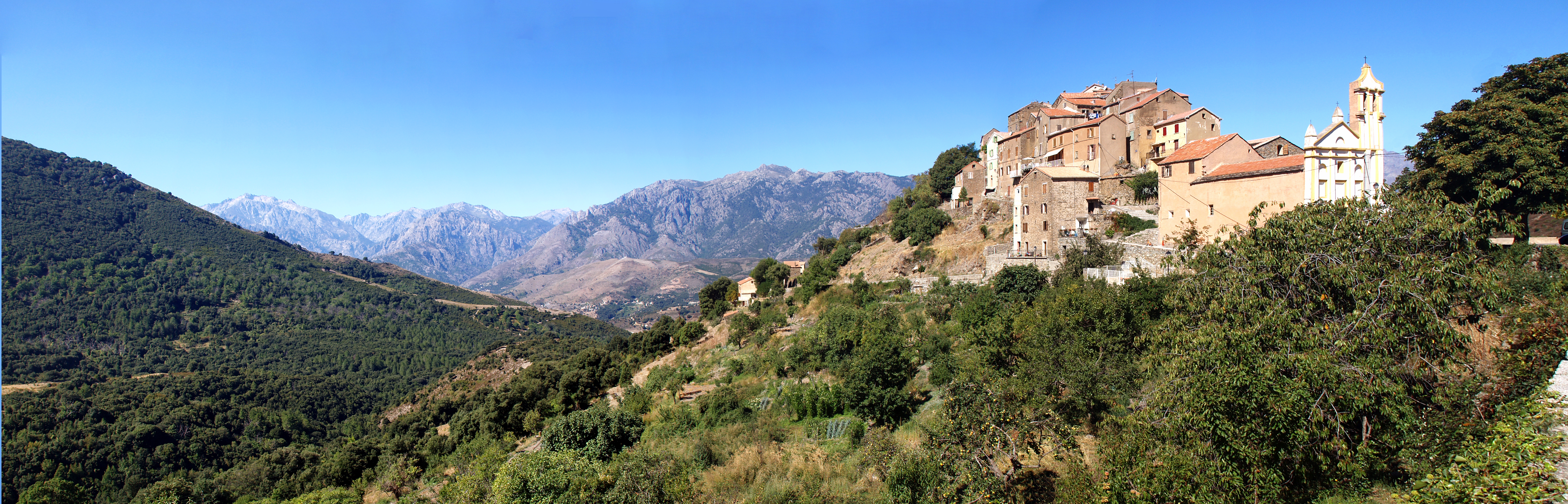 Tralonca, Bozio (Corse) - Panorama de Tralonca